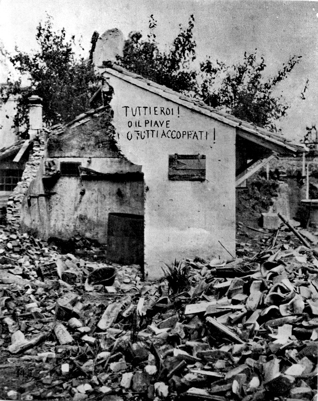 Foto: Bestetti & Tumminelli, Milano recto: A S. Andrea Ponte di Piave - Iscrizioni patriottiche dei nostri soldati. Cartolina che riproduce una celebre foto tratta dalla Raccolta della Sez. Fotocinematografica del Comando Supr. del R. Esercito It. Fa parte della collana pubblicata per celebrare la resistenza italiana in occasione della battaglia del Solstizio, l'ultima grande offensiva sferrata il 15 giugno 1918 dagli austriaci al fine di imprimere al conflitto quella svolta decisiva che avrebbe consentito un completo e definitivo sfondamento del fronte italiano. In realtà, dopo alterne vicende che videro anche il passaggio del Piave da parte di truppe austro-ungariche, il 26 giugno questa battaglia si concluse, dal punto di vista territoriale, in un nulla di fatto. Molto importanti furono invece gli effetti sul morale di entrambi gli eserciti impegnati: per gli austriaci, con un passivo drammatico in termini di uomini e mezzi (le perdite in questa battaglia ammontarono a 150.000 uomini), sfumata l'ultima occasione di porre termine alla guerra sul fronte italiano, persa definitivamente l'iniziativa sul piano militare soprattutto a causa delle disastrose condizioni socio-economiche in cui versava l'Impero, fu l'inizio della fine. Gli italiani invece, dando prova di saper resistere a un urto formidabile, accantonarono il complesso della disfatta di Caporetto e cominciarono concretamente a porre le basi della vittoria che arriderà loro entro pochi mesi. Luogo: Sant'Andrea di Barbarana di San Biagio di Callalta (TV)